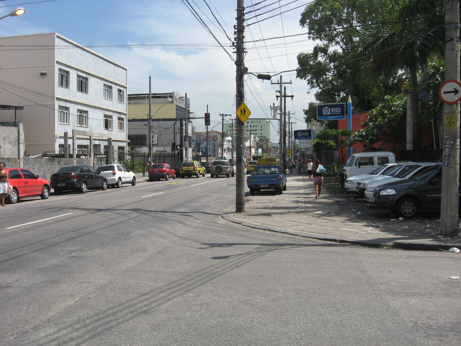 Vista do bairro Engenho de Dentro, no Rio de Janeiro.